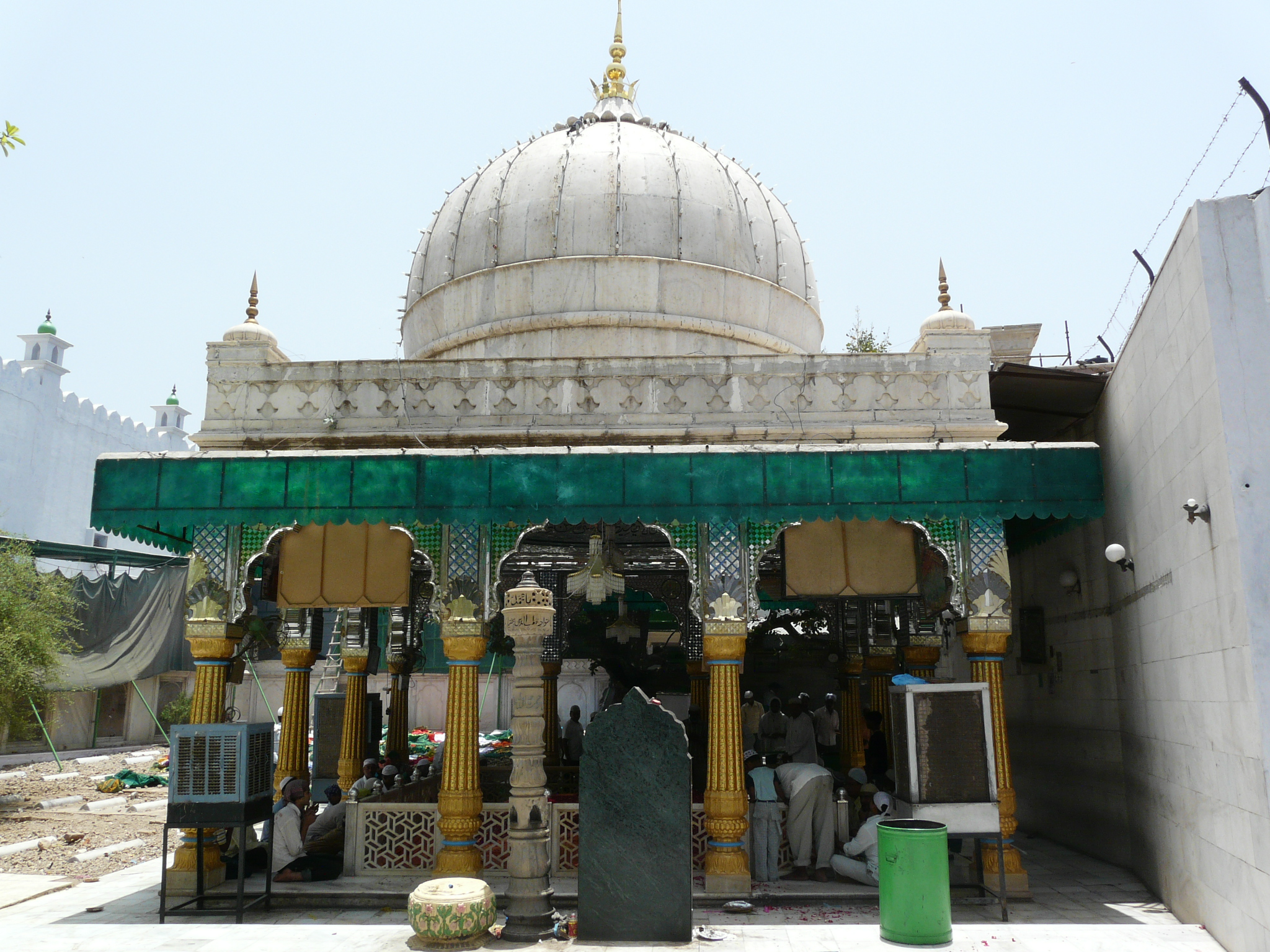 Tomb of Sufi saint, Qutbuddin Bakhtiyar Kaki in Mehrauli, Delhi.